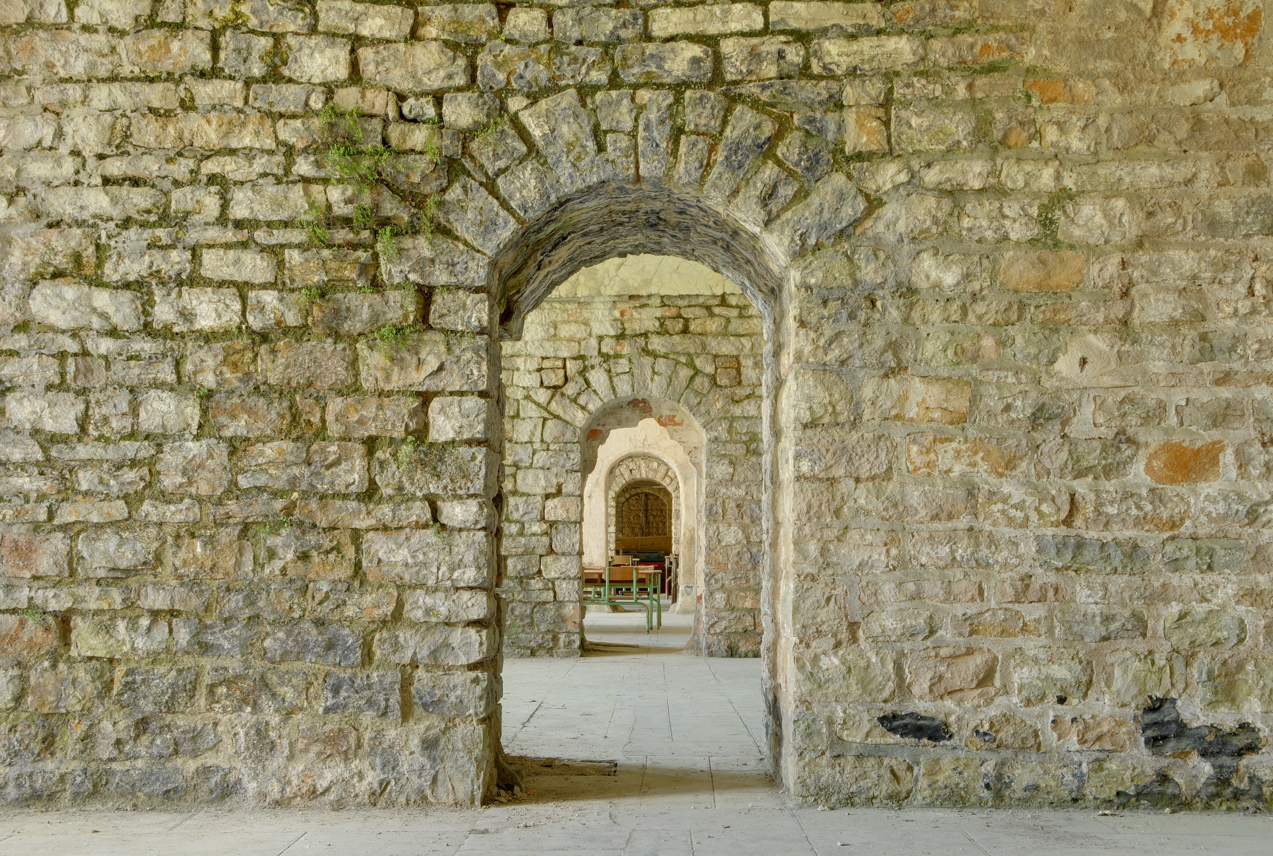 Fort des Basses Perches : dans les chambrées. Basses perches fortifications.